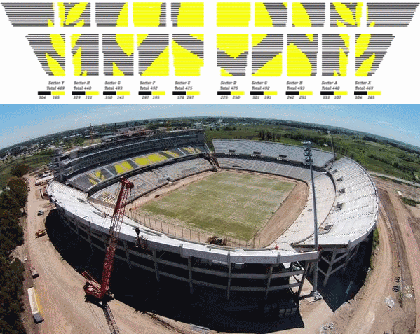 Diseño de la tribuna principal del estadio de Peñarol, ya terminada. Imagen del estadio extraída de